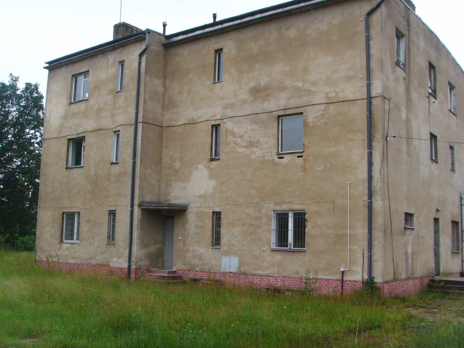 Strażnica WOP Gubin